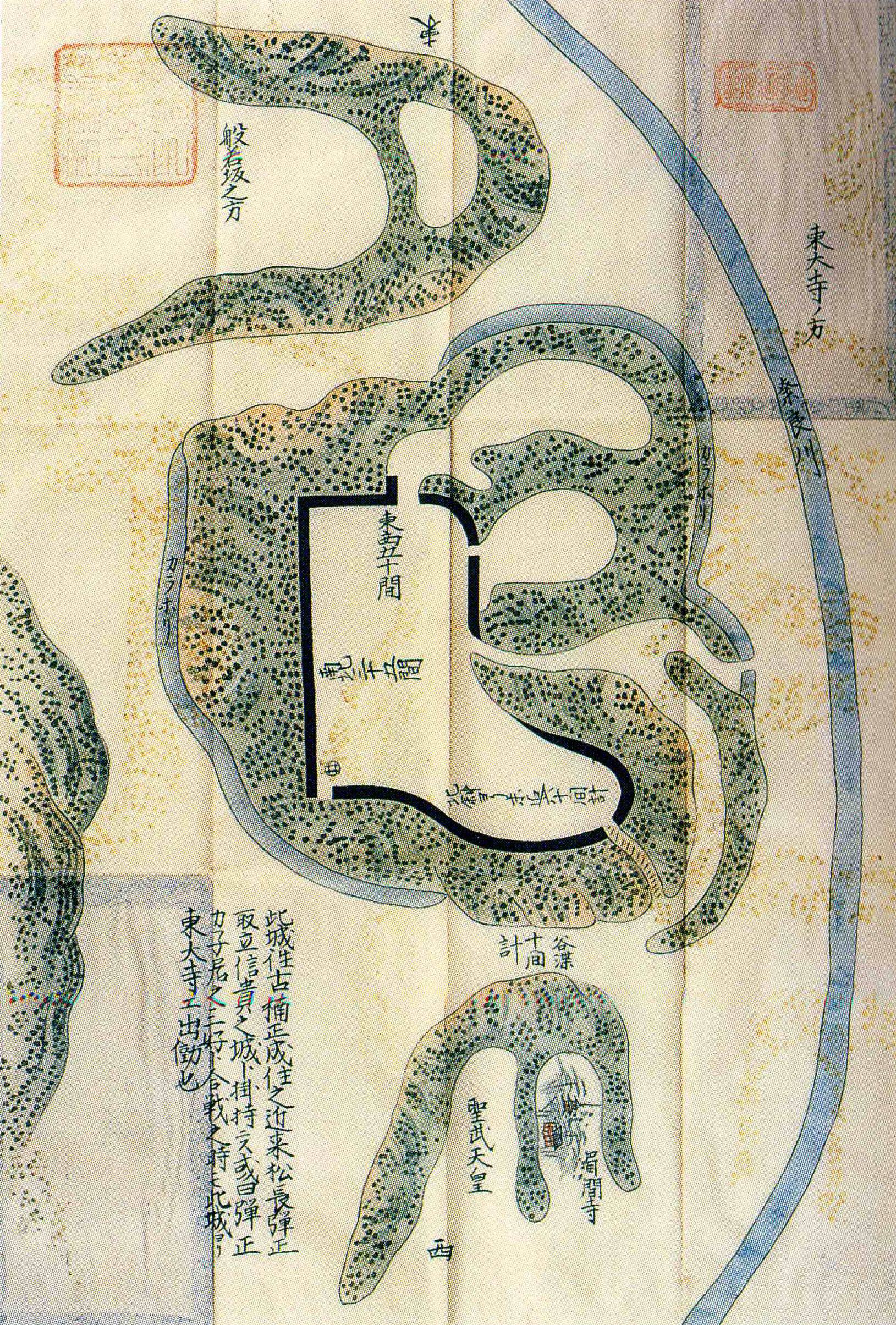 諸国古城之図大和多聞城